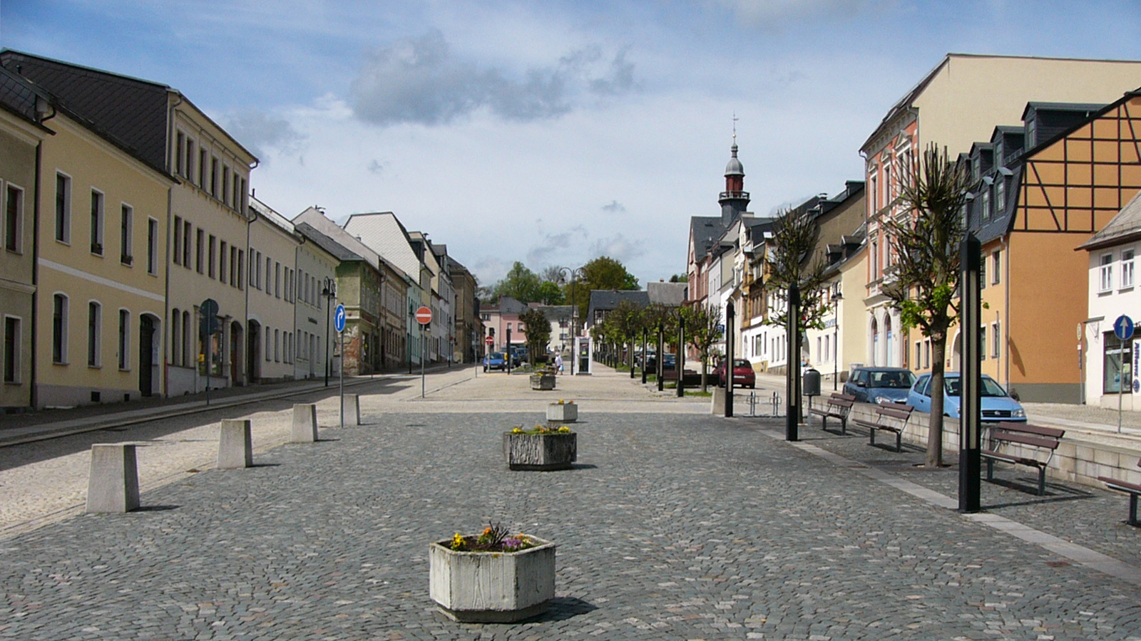 Adorf, Marktplatz - im Denkmalschutzgebiet Stadtkern Adorf (Vogtl.)